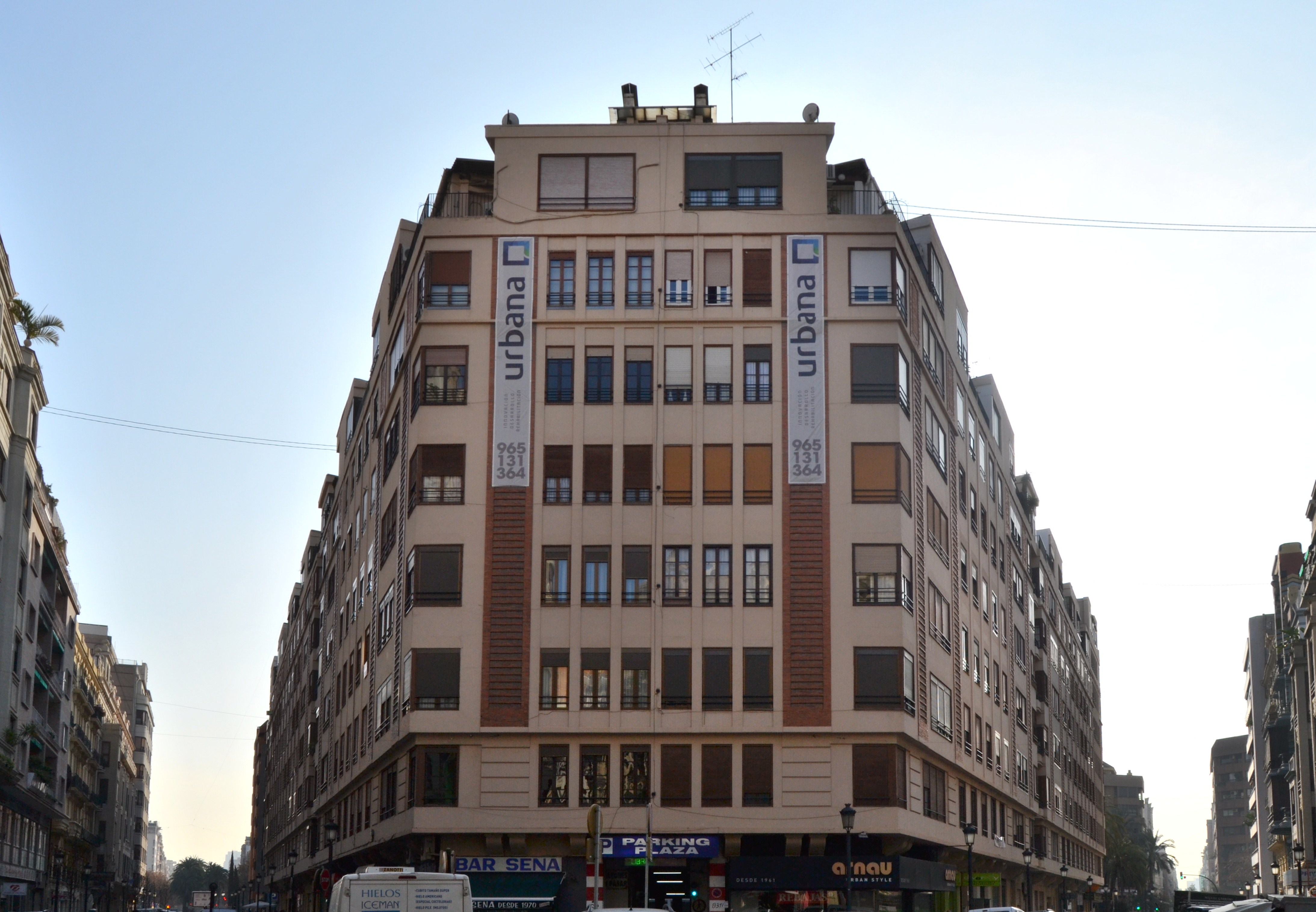 Grup Residencial Agents Comercials Secció A, València.